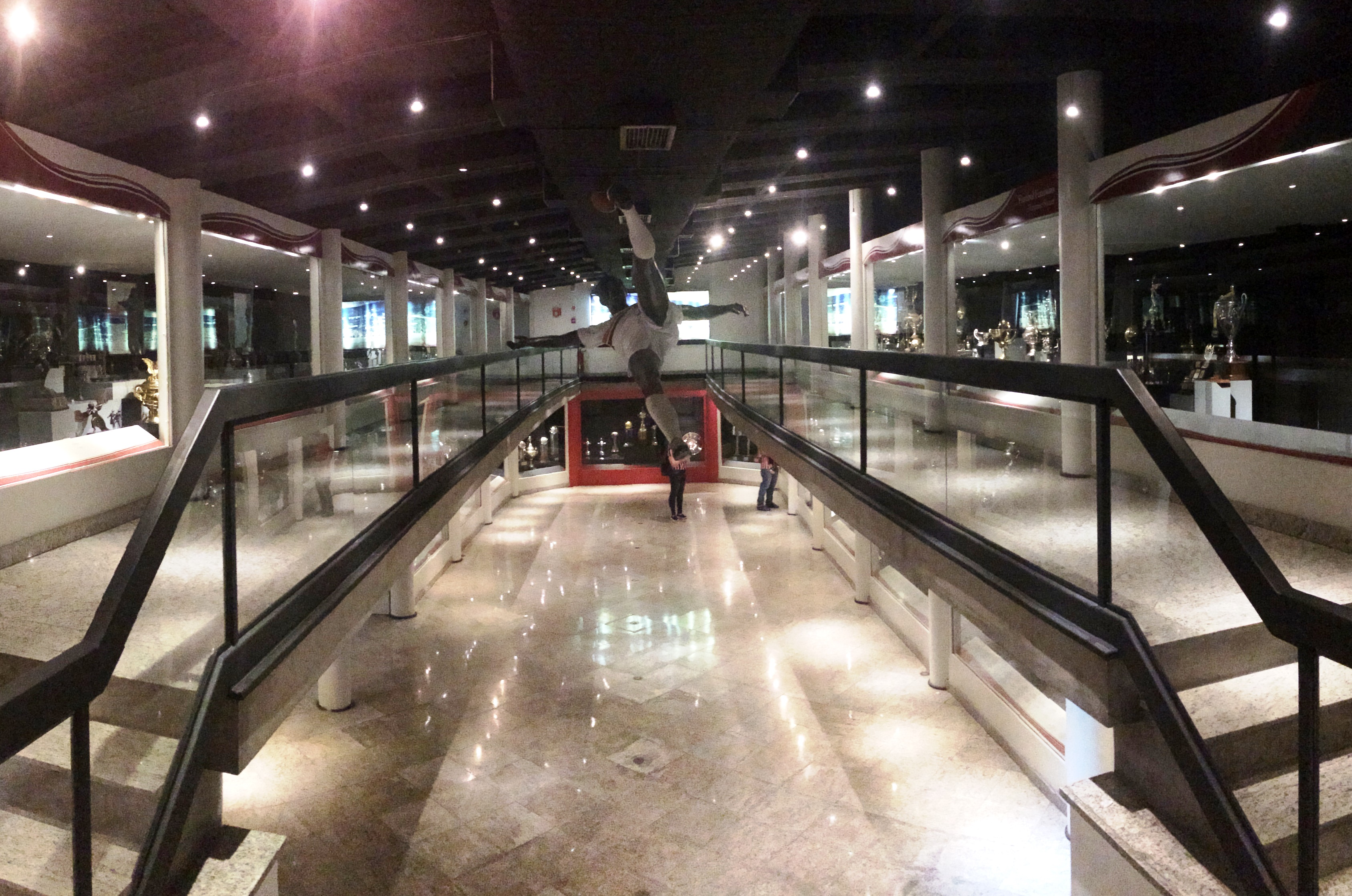 Vista do segundo andar do Memorial do São Paulo